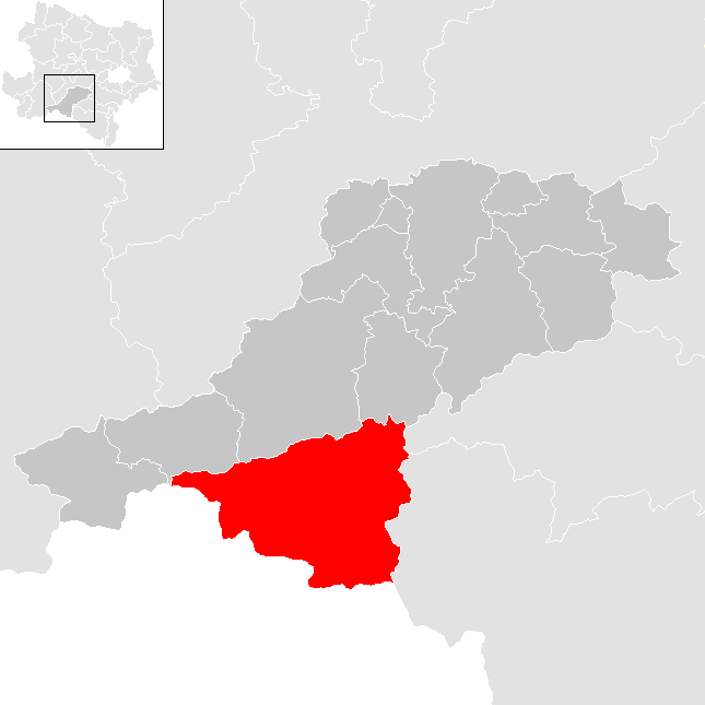 Bezirk Lilienfeld